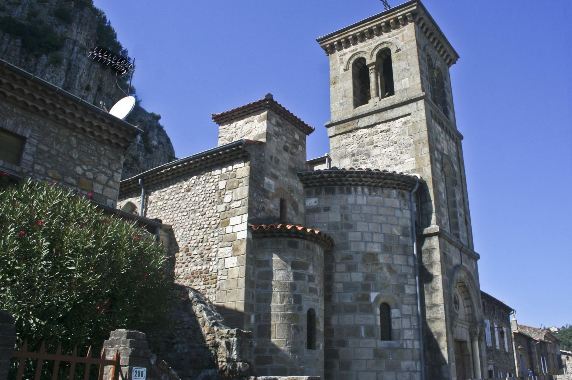 Soyons, Ardèche, France : l'église